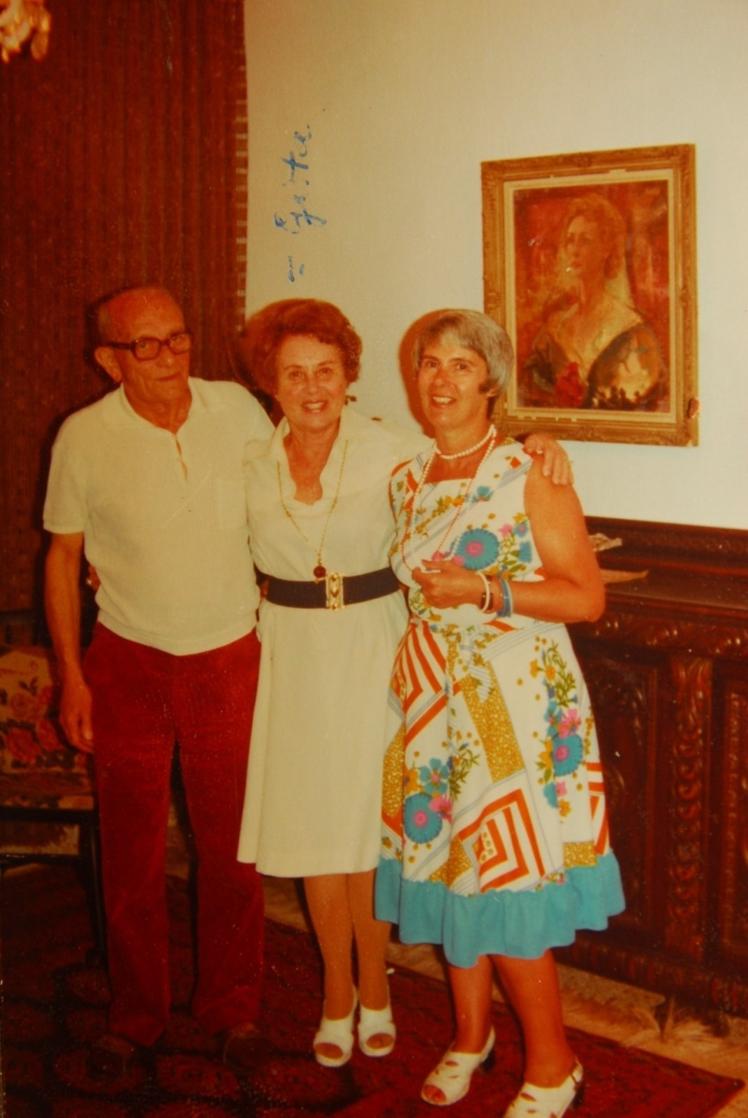 יוסף מישן היה רופא, קרדיולוג, ייסד את הקתדרה להיסטוריה ולפילוסופיה של הרפואה, בבית ספר לרפואה, אוניברסיטת תל אביב יוסף מישן (משמאל) עם בת זוגו השנייה גיטה אברבאנל. סוף שנות ה-70, תחילת שנות ה-80, כנראה בדירתם ברח' בלפור.